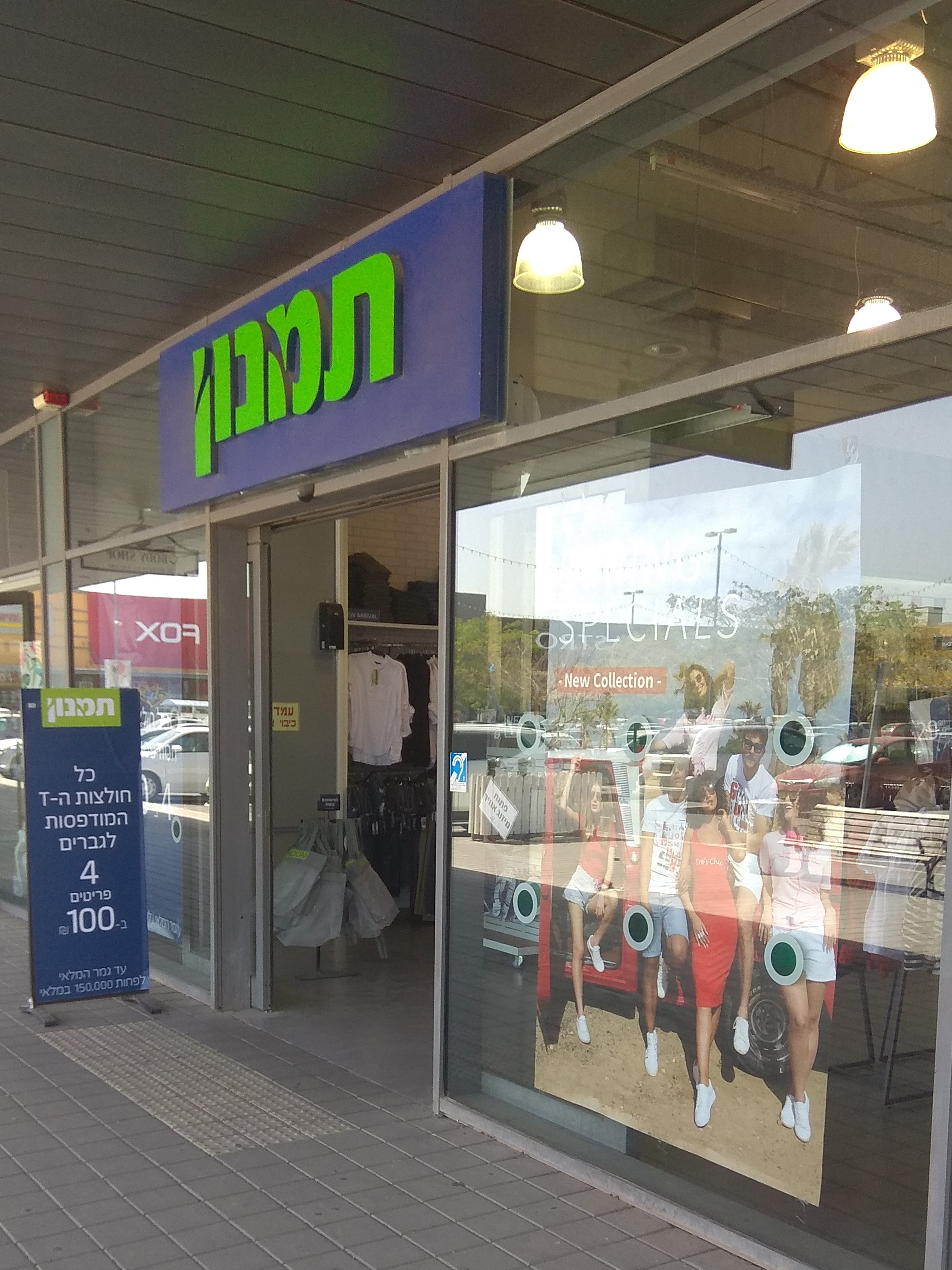 סניף תמנון